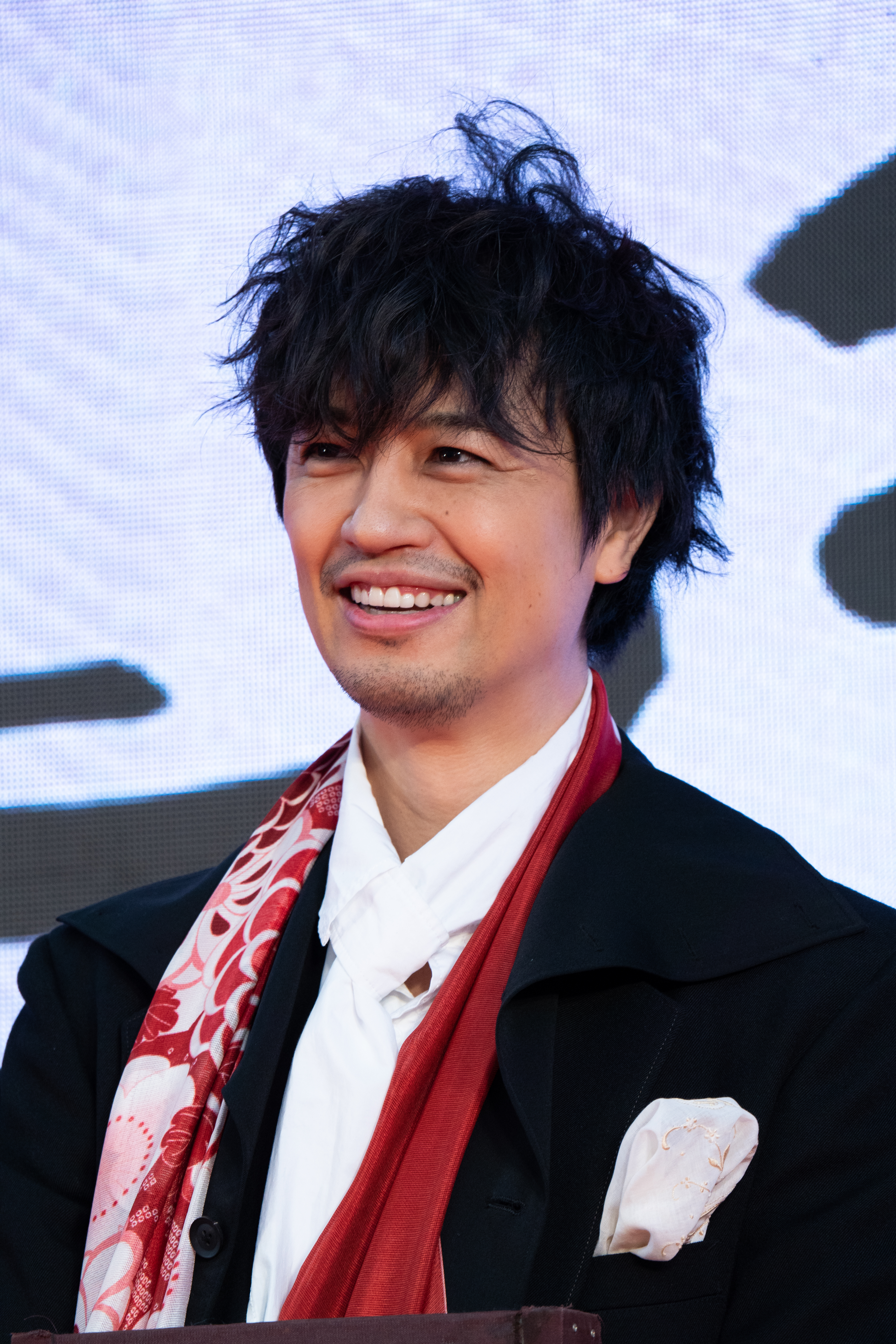 第32回 東京国際映画祭 オープニングセレモニー 斎藤工 (フォークロア TATAMI)